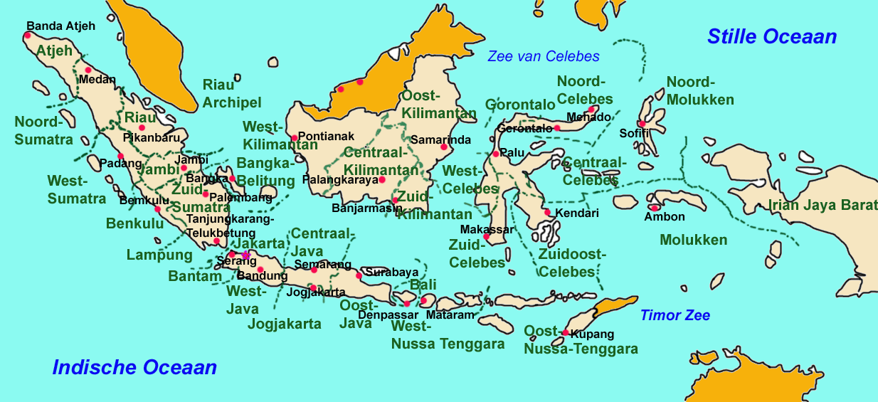 eigen werk